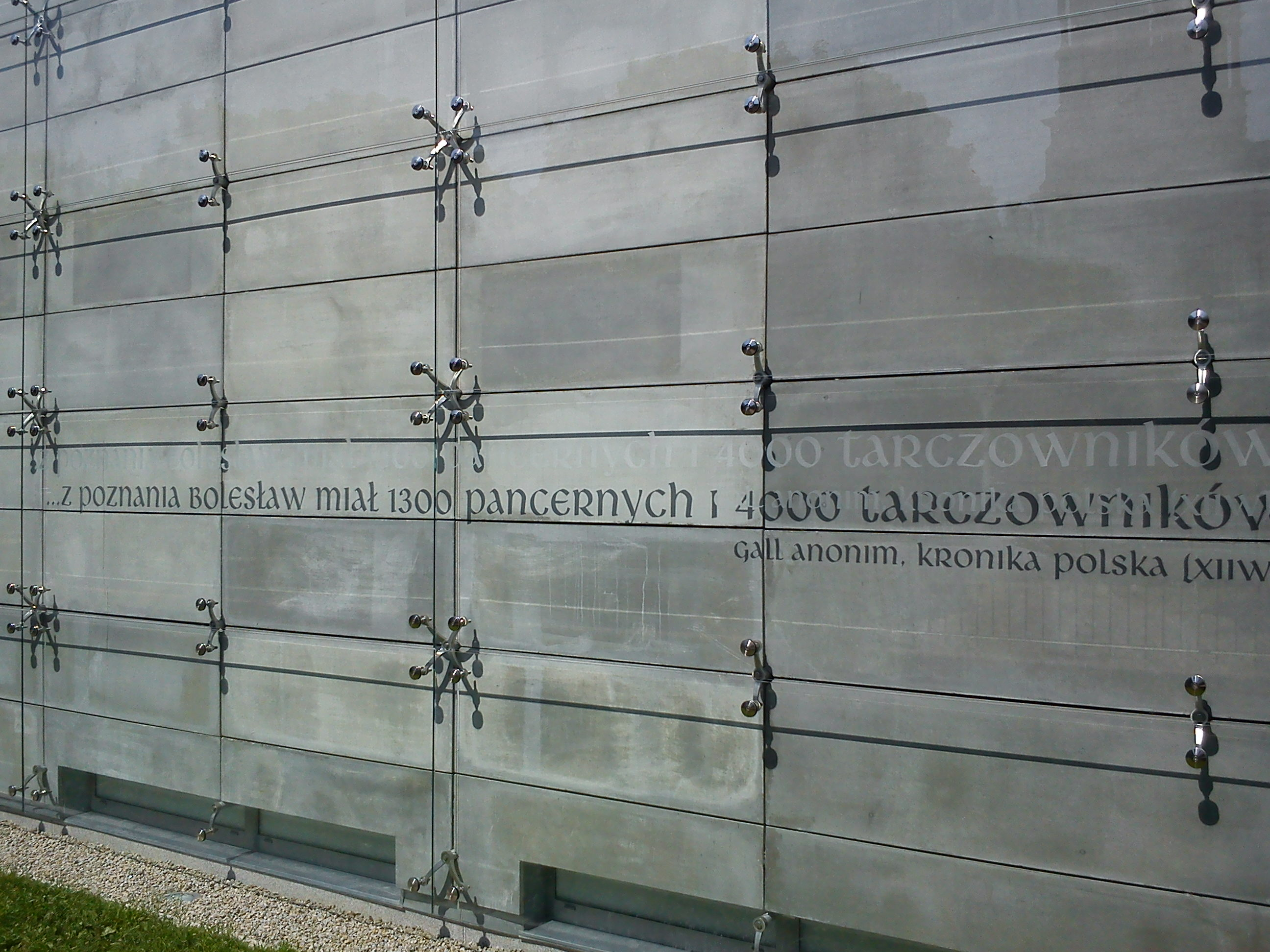 Rezerwat Archeologiczny na Ostrowie Tumskim w Poznaniu (budowa).